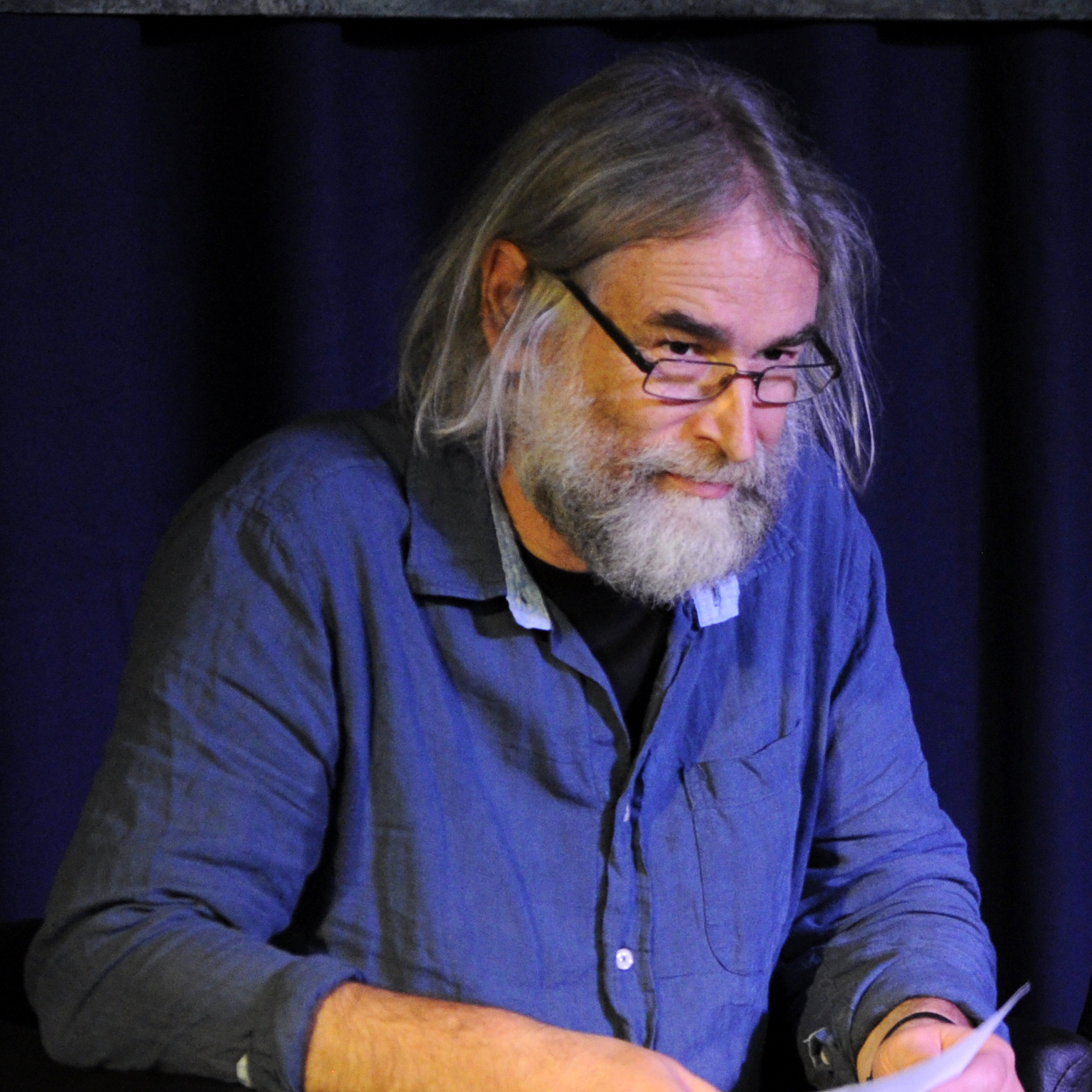 Jens Wonneberger auf der Messe Schriftgut 2015